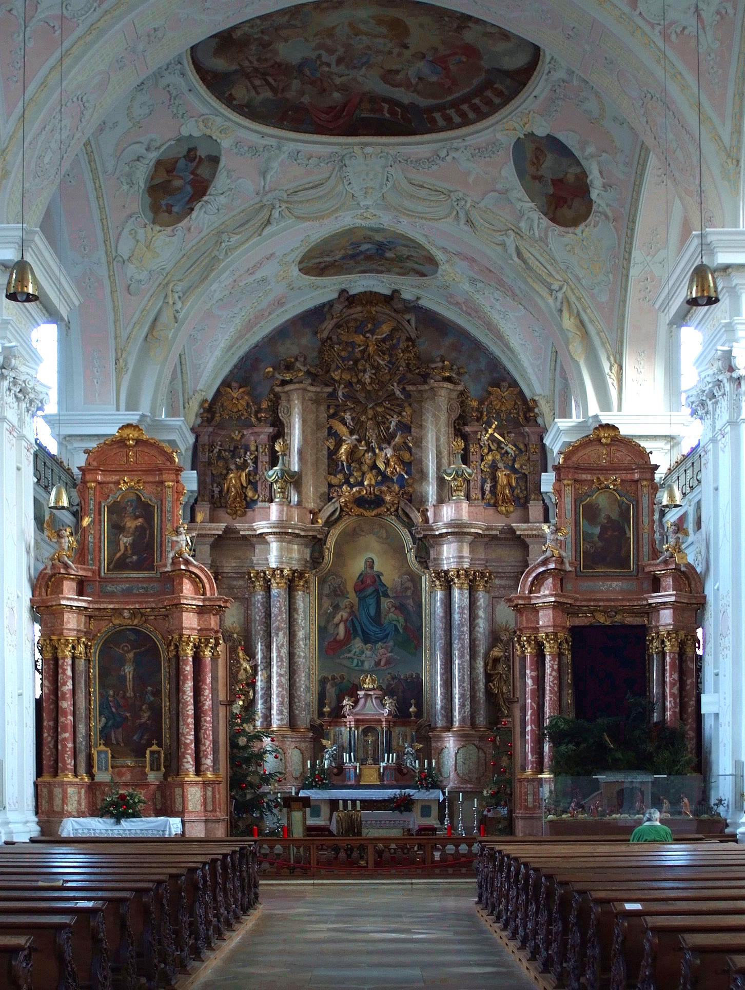 Klosterkirche Pielenhofen, Blick zum Altar